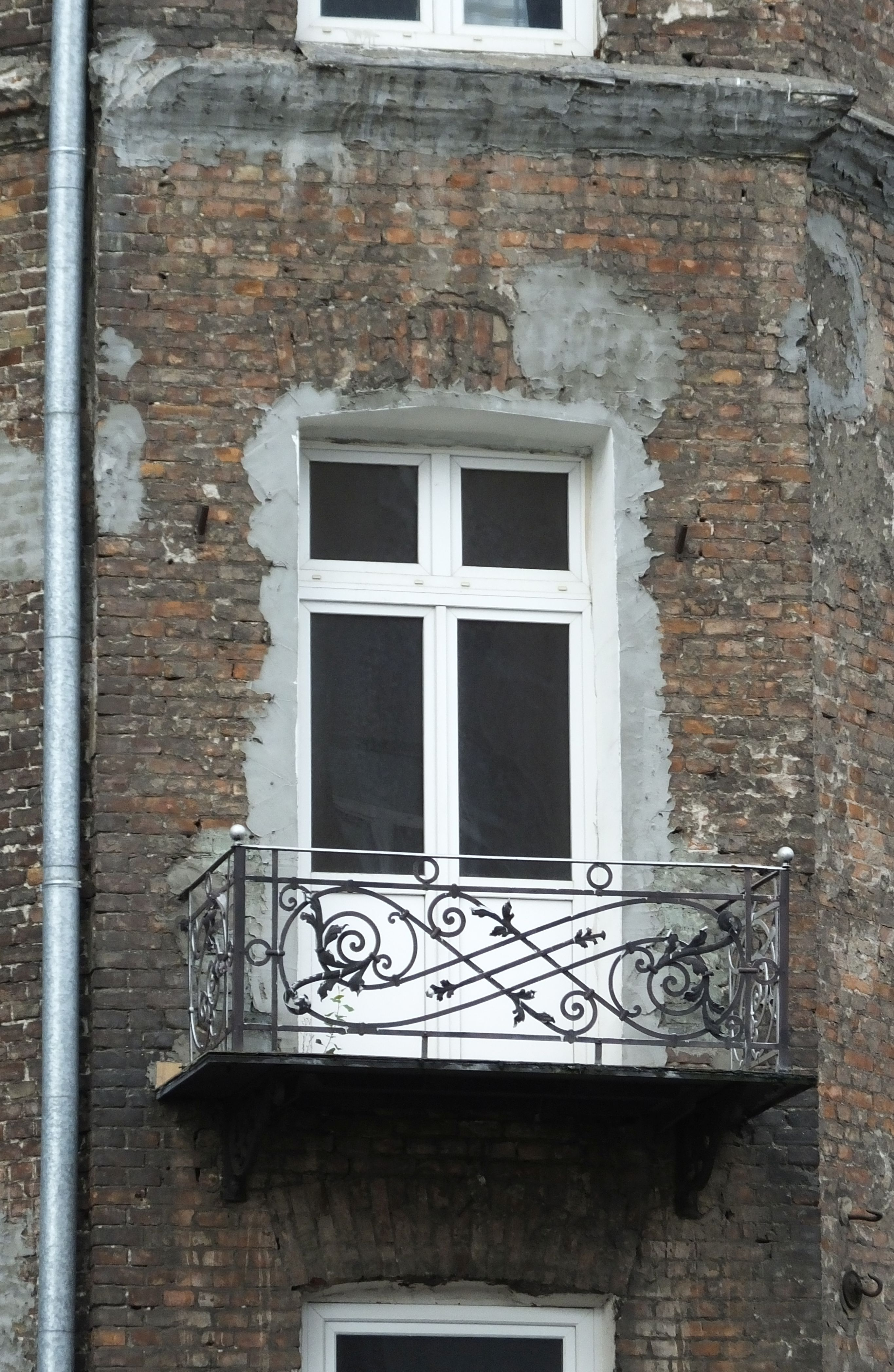 Kamienica Bakela, ulica Chmielna 126 w Warszawie